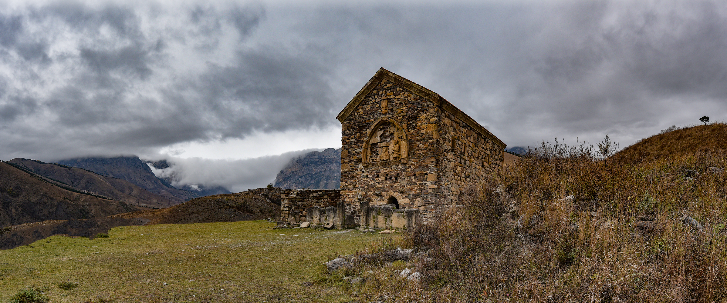 Храм Тхаба - Ерды. Горная Ингушетия. Temple Thaba - Erds. Mountainous Ingushetia.